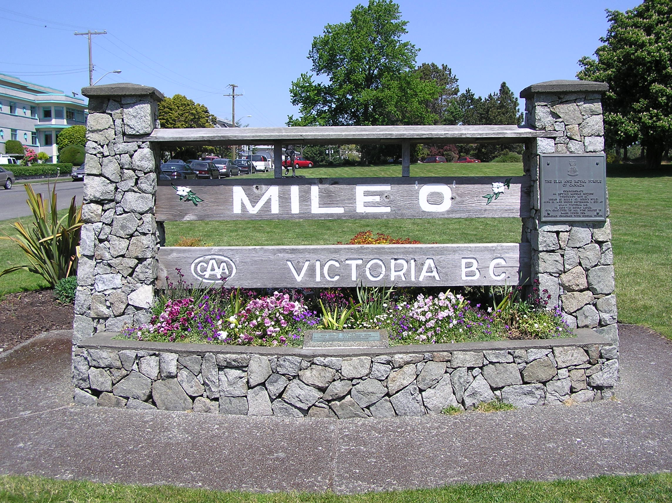 Mile Zero Marke des Trans-Canada Highways in Victoria BC